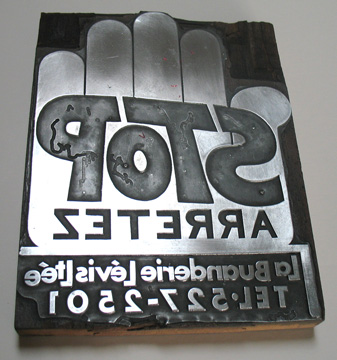 Cliché typographique en magnésium (communément appelé « mag ») réalisé à Québec dans les années 1970. Le cliché pouvait servir directement pour l'impression ou pour la réalisation d'un flan. Hauteur : 23 cm, largeur : 17 cm, épaisseur (hauteur typographique) : 23 mm.